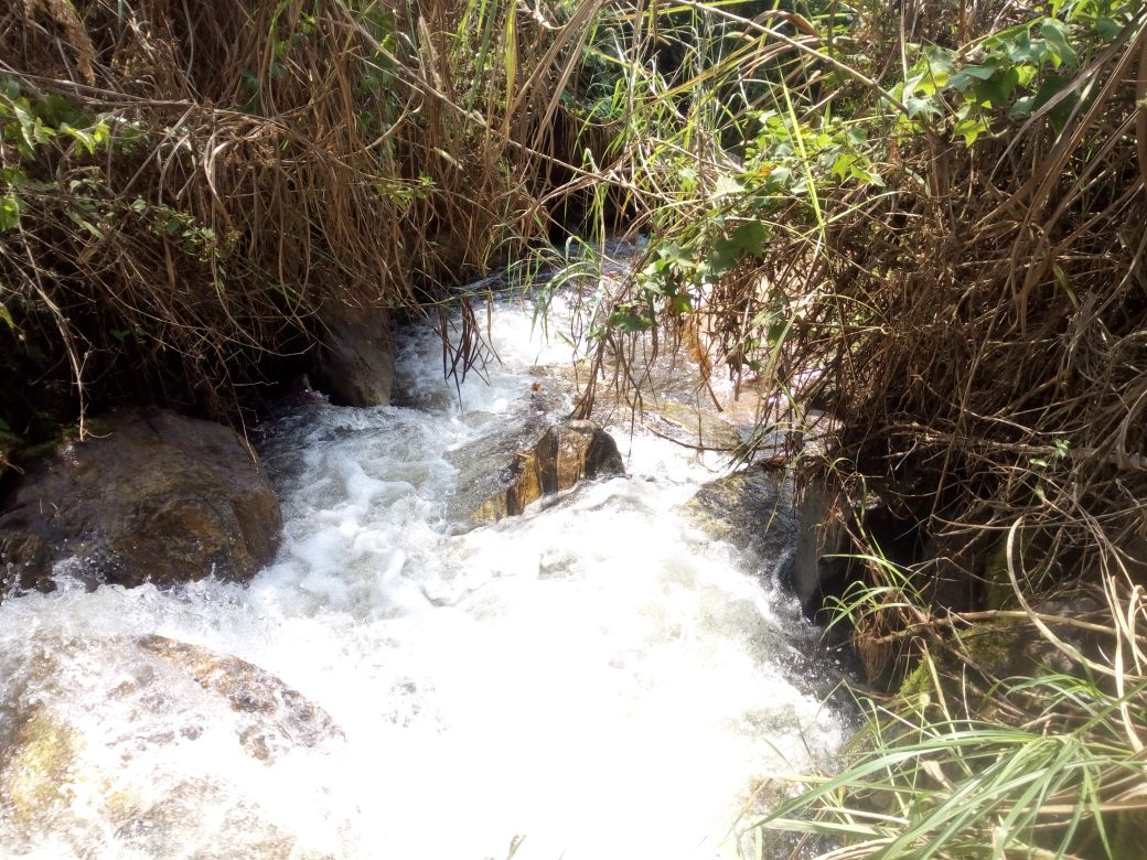 picture showing a stream at the foot of Santchou hill, West Region, Cameroon